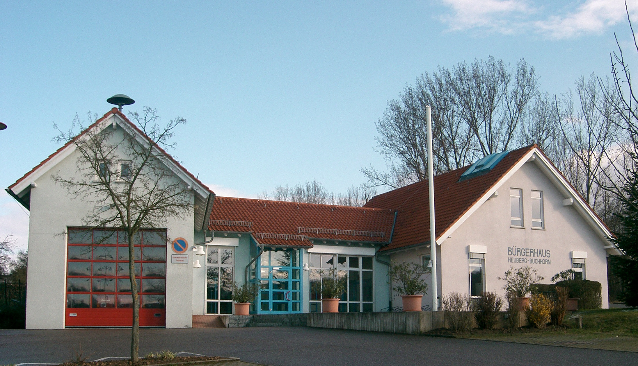 Bürgerhaus Heuberg-Buchhorn mit Kindergarten und Feuerwehrmagazin in Pfedelbach